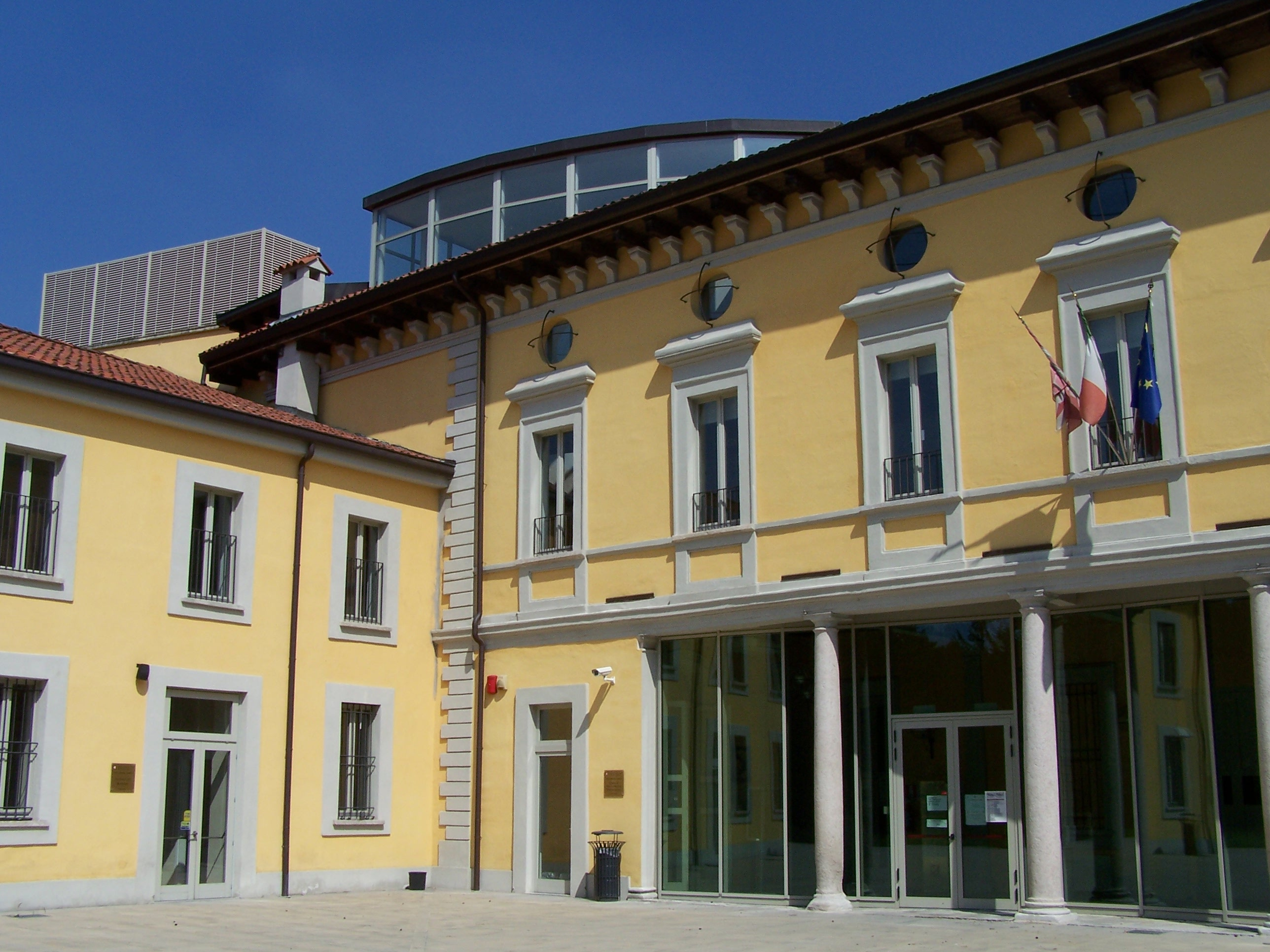 Villa di Breme Forno (solo esterni) This is a photo of a monument which is part of cultural heritage of Italy.